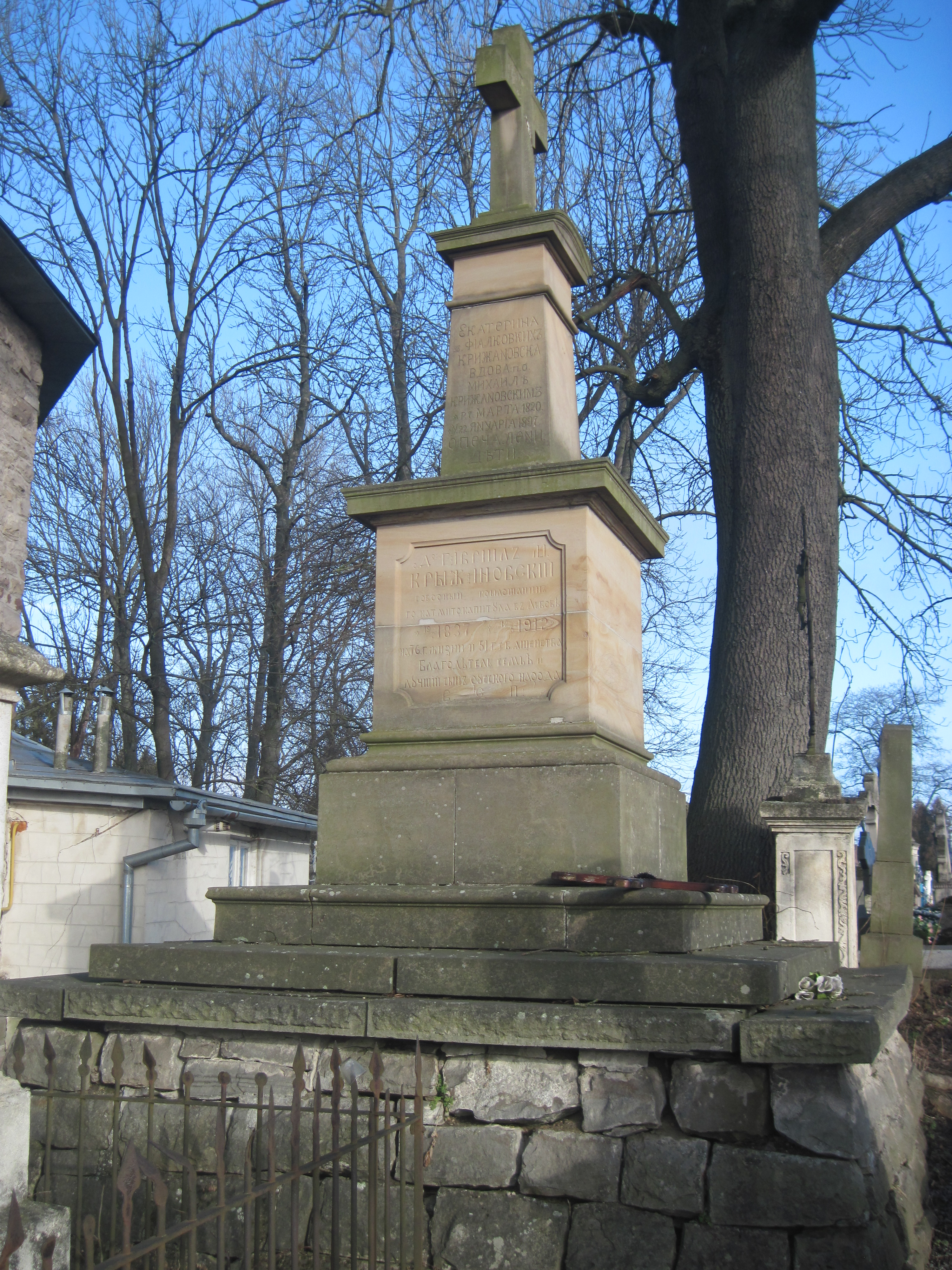 Надгробок Г. Крижановського, Нагірянка-Бучач